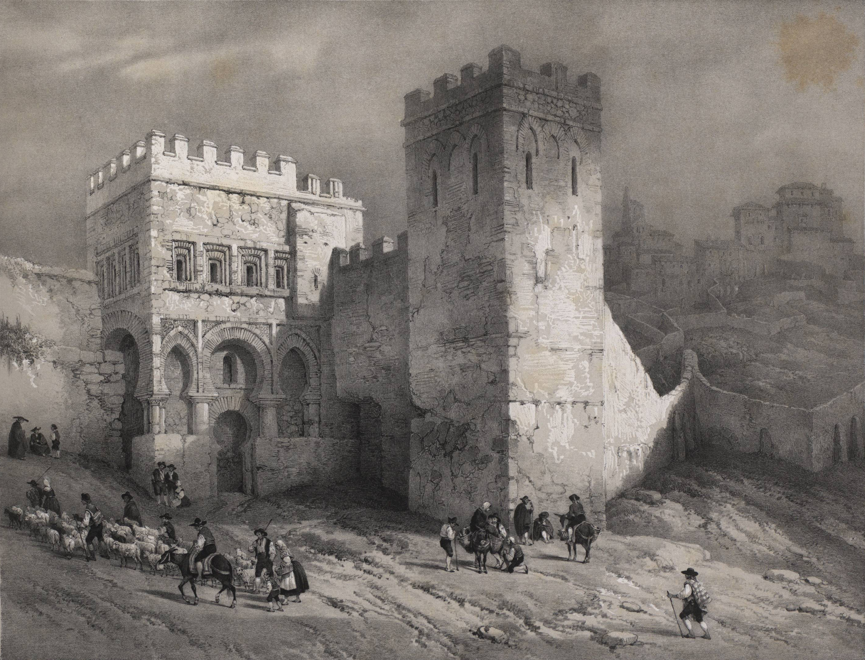 Antigua al lado de la de Visagra.